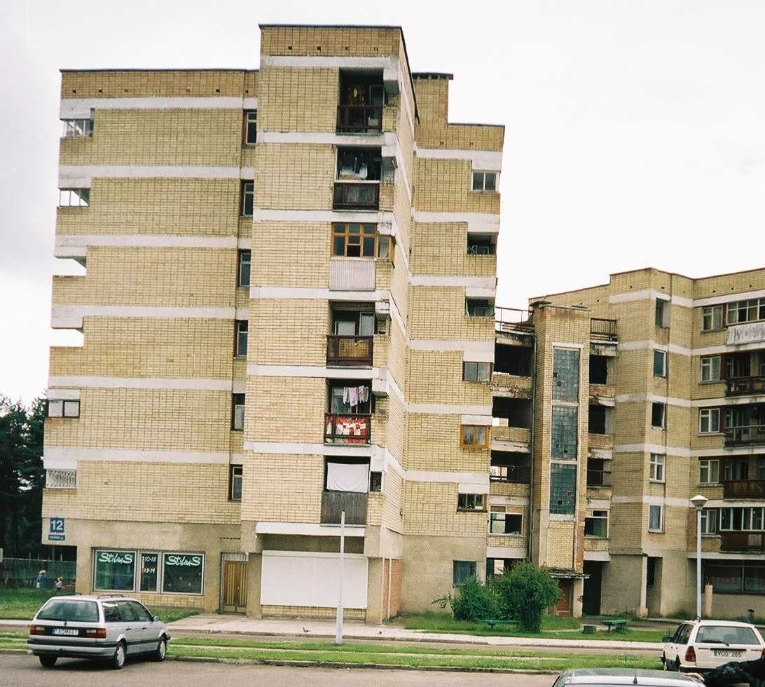 Visaginas - fragment miasta (lipiec 2004).